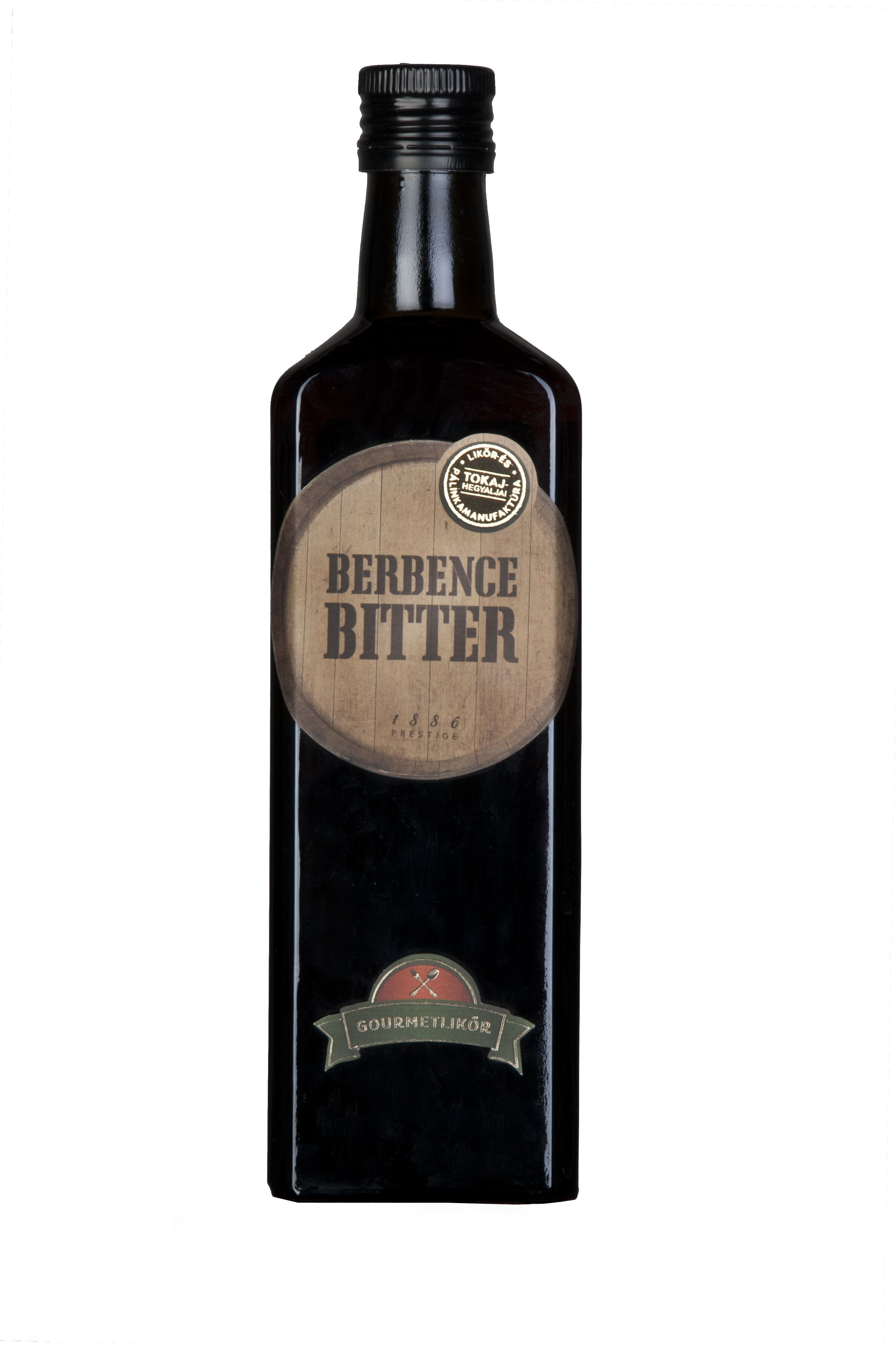 Berbence Bitter, Magyarország első gourmetlikőrje